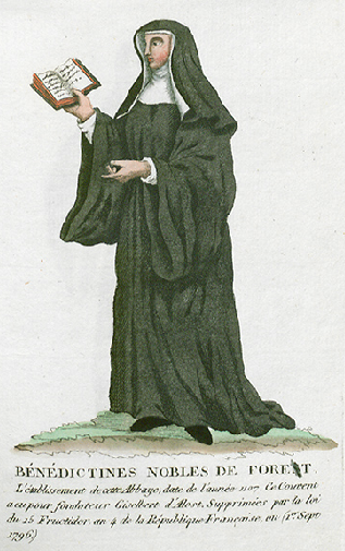 Collection de costumes de tous les ordres monastiques, supprimés à differentes époques, dans la ci-devant Belgique, Bruxelles, Philippe Joseph Maillart et sœur, 1811